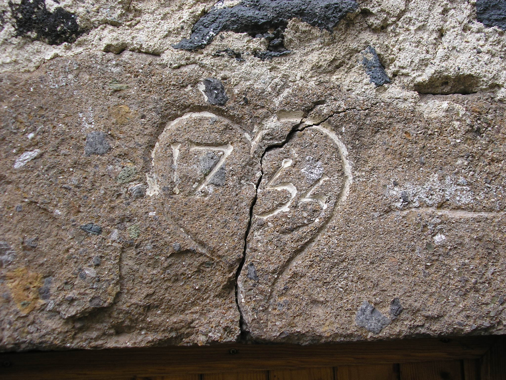 Linteau de la porte d'entrée de la maison de la béate de Civeyrac portant l'année de construction, 1733.